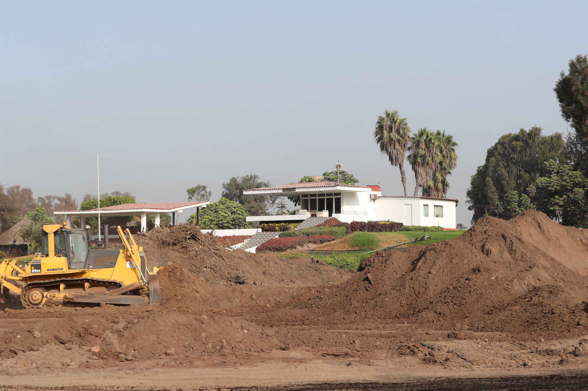 MINISTRO HUERTA SUPERVISÓ TRABAJOS PARA JUEGOS PANAMERICANOS EN LA ESCUELA DE EQUITACIÓN DEL EJÉRCITO